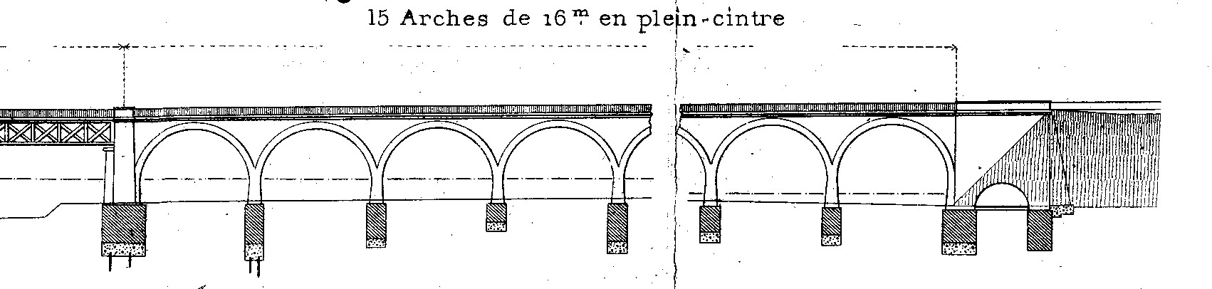 Viaduc ferroviaire de Gien – Commune de Gien – Département du Loiret – France – Construit en 1893 - Elévation du viaduc en rive droite